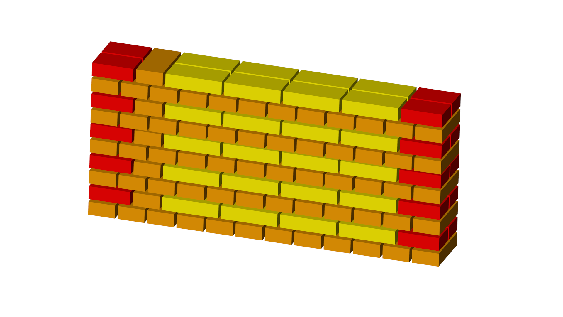 Blockverband